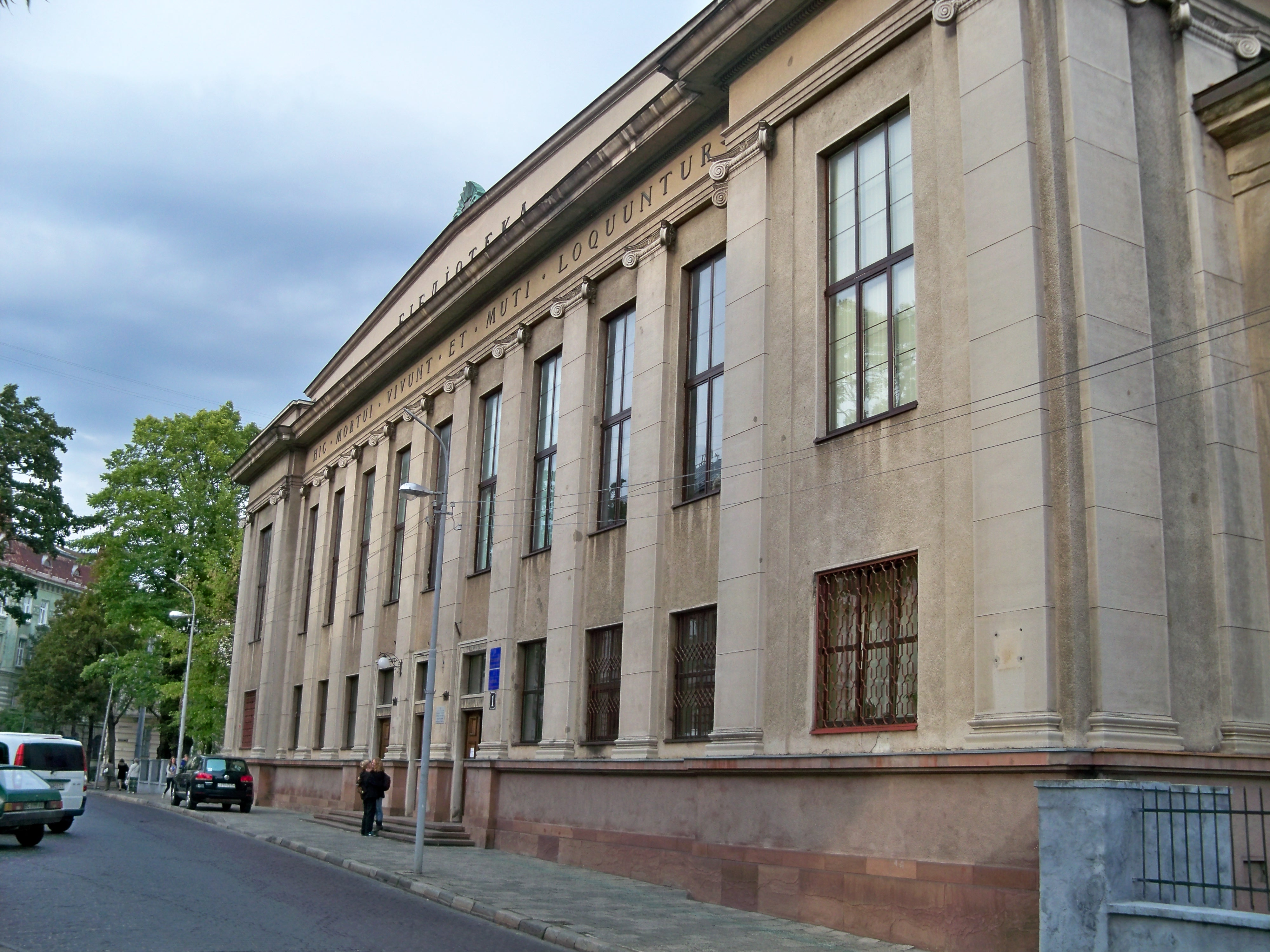 бібліотека науково-технічна, Львів, Професорська, 1